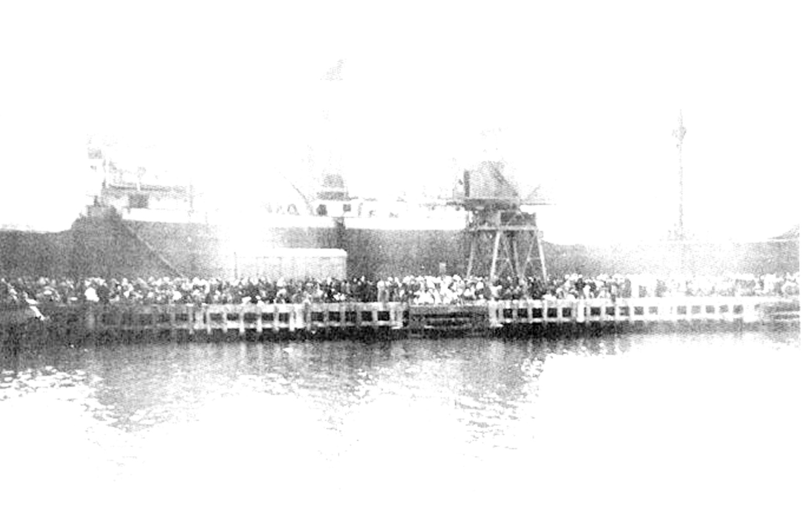 משפחות ערביות מחיפה בורחות דרך הים ללבנון באניות בריטיות אפריל 1948.